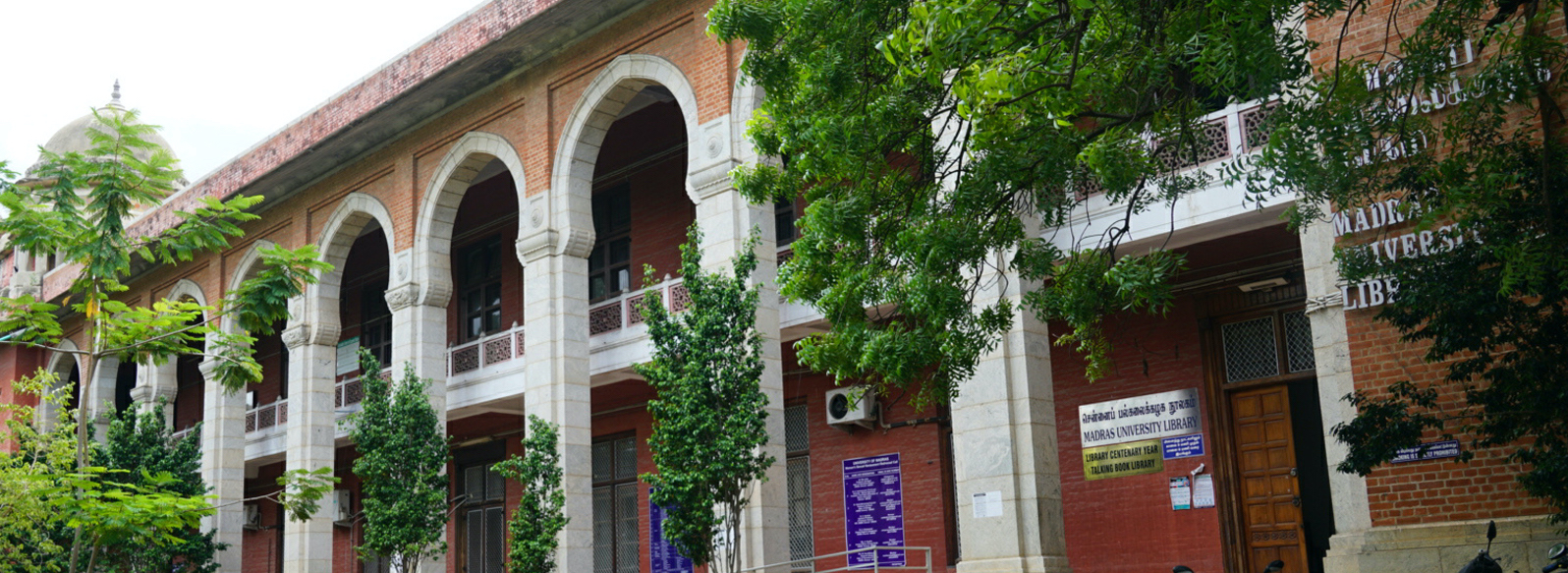 சென்னைப் பல்கலைக்கழகத்தின் கட்டுமானத் தோற்றம்